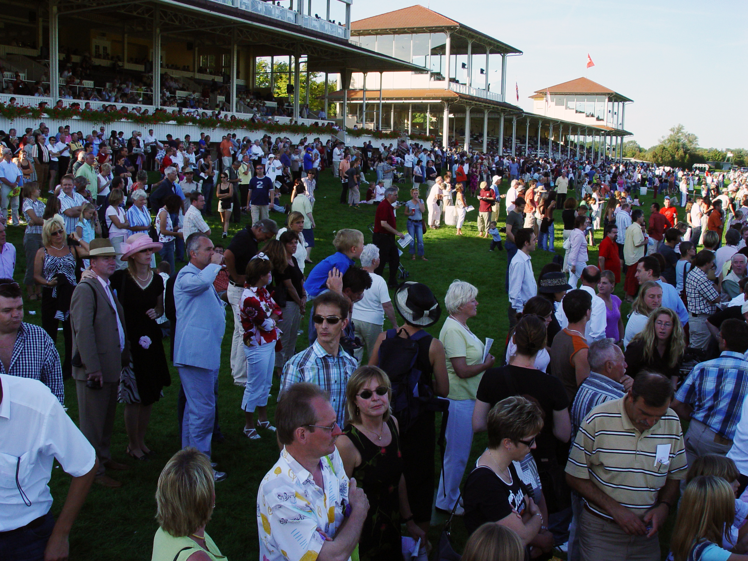 Zuschauer beim Pferderennen in Iffezheim.